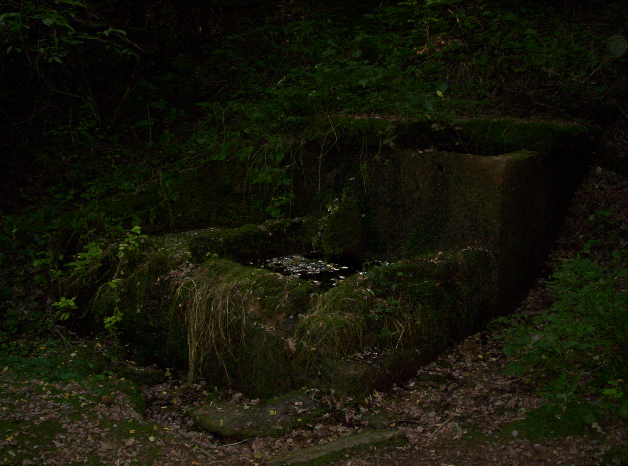 La fontana carsica da cui probabilmente prendevano l'acqua i frati della Certosa del Montello. Oggi nel Montello è rimasta solo questa